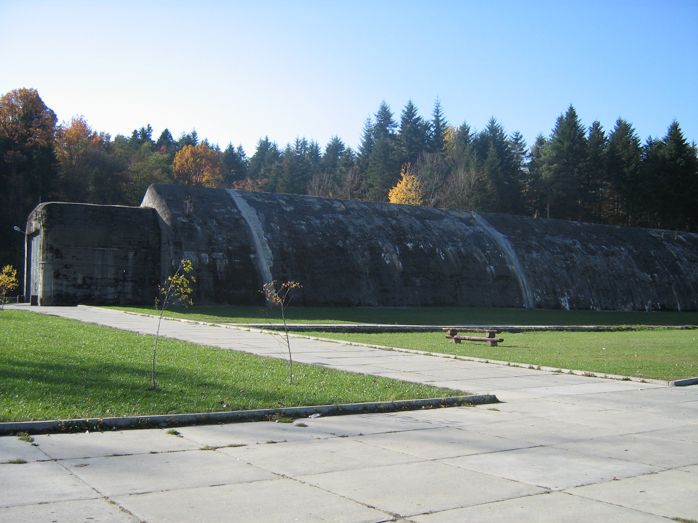 Stępina - schron tunelowy dla pociągu sztabowego, 1940–1941